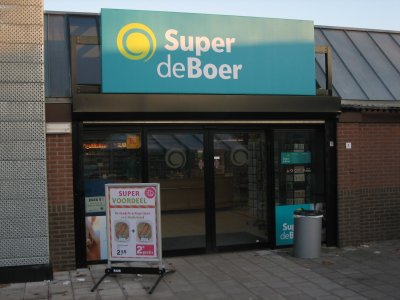 Zelf geschoten foto van vernieuwde Super de Boer filiaal, ter illustratie bij het artikel over Super de Boer.